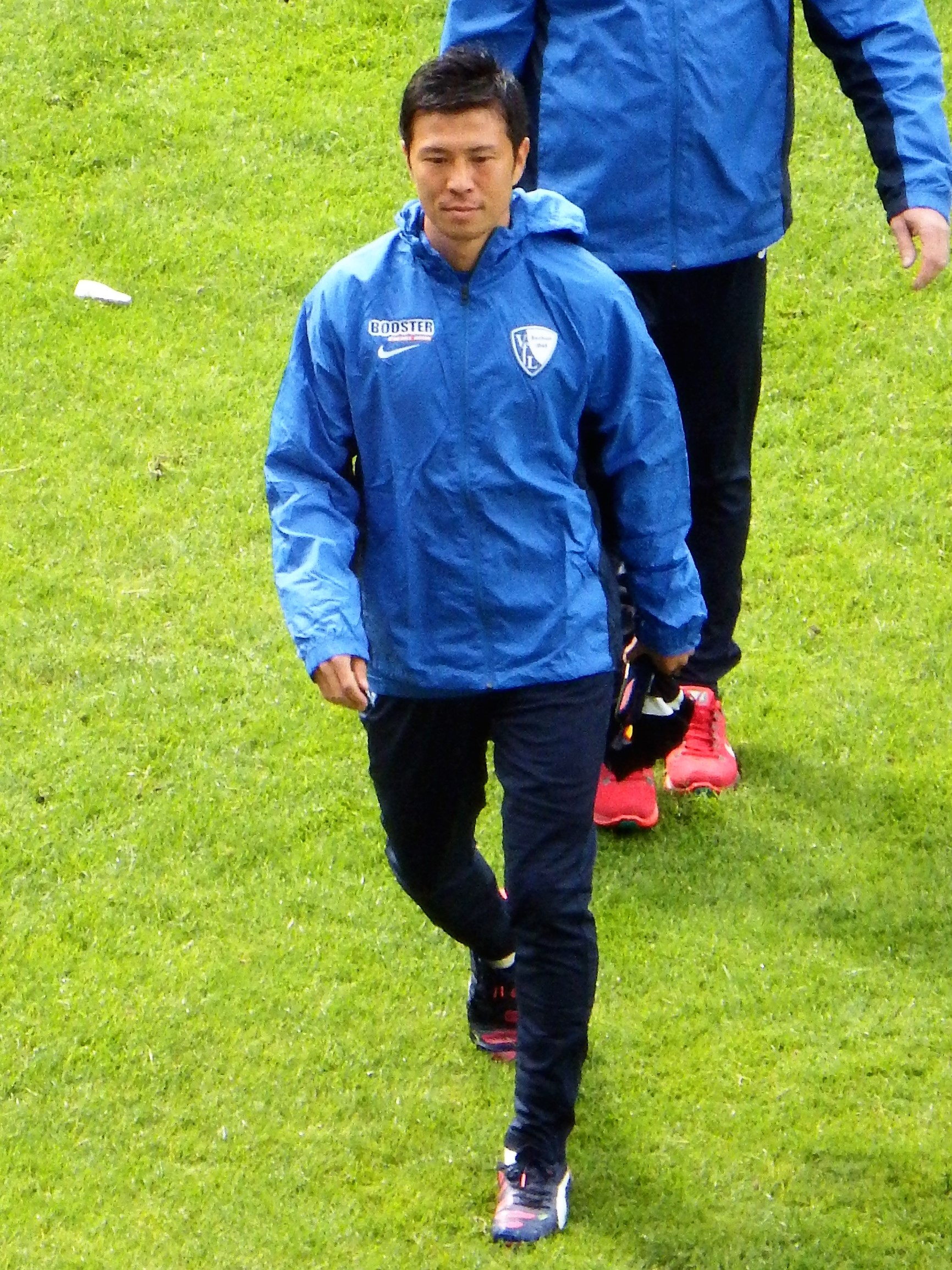 Tasaka, Yusuke Bochum